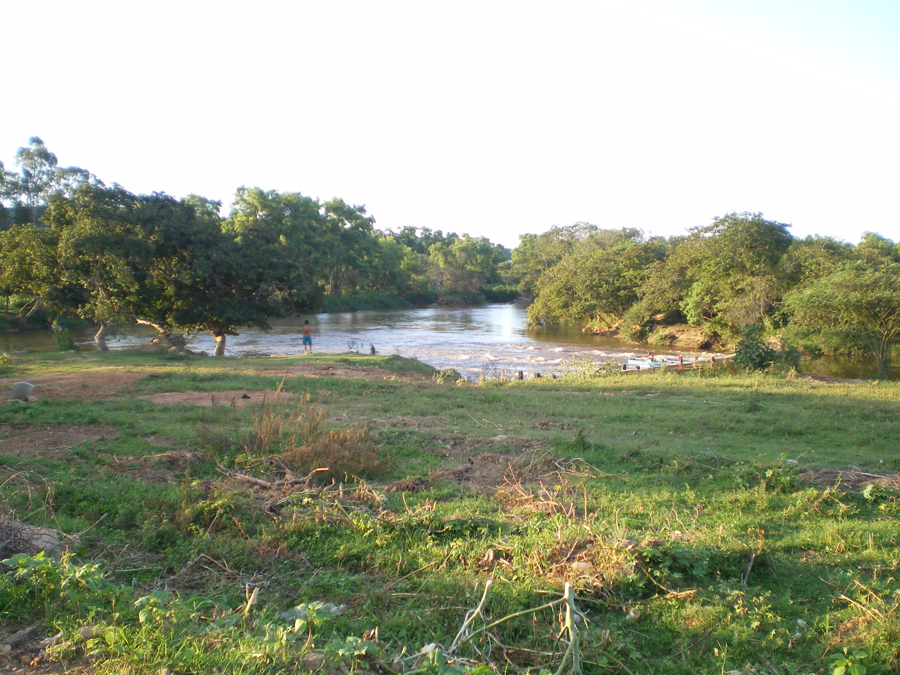 Pesqueiro Urbano no Rio das Mortes